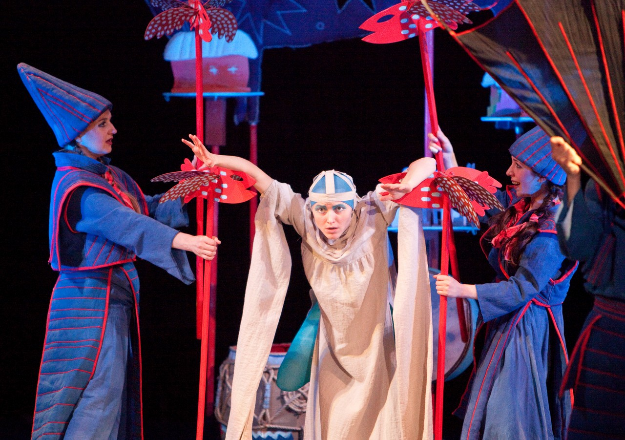 Харьковский государственный академический театр кукол им. В.А. Афанасьева на фестивале «Белгородская забава 2012». Спектакль «Майская ночь».